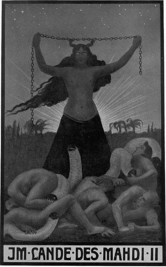 Buchdeckel des Romans Im Lande des Mahdi II von Karl May. Ausgabe von 1905, gestaltet von Sascha Schneider.